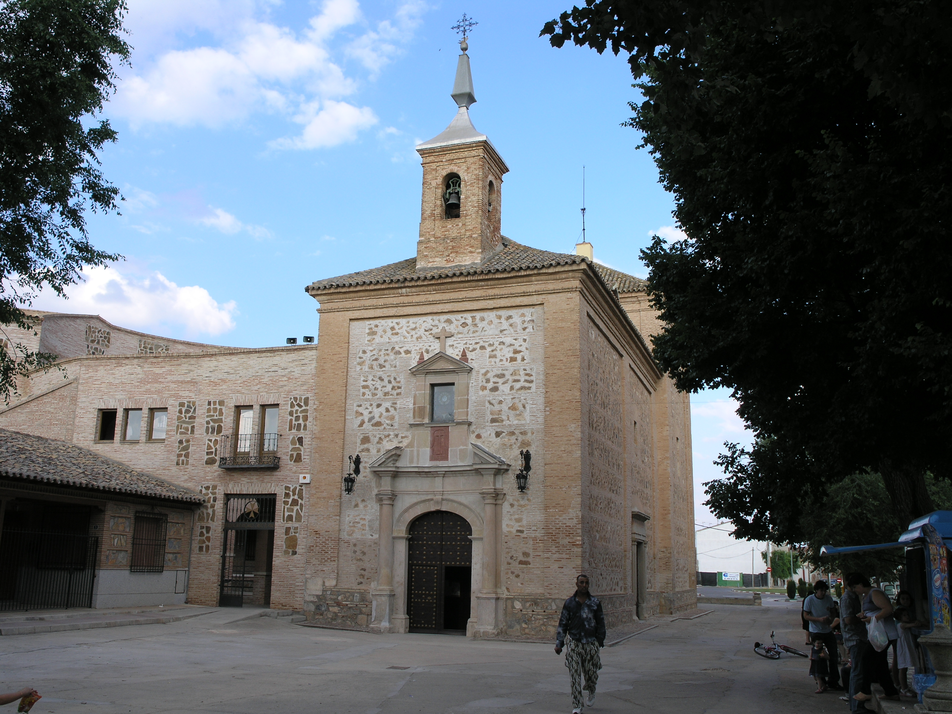 Ermita Cristo del Prado, construido en 1660